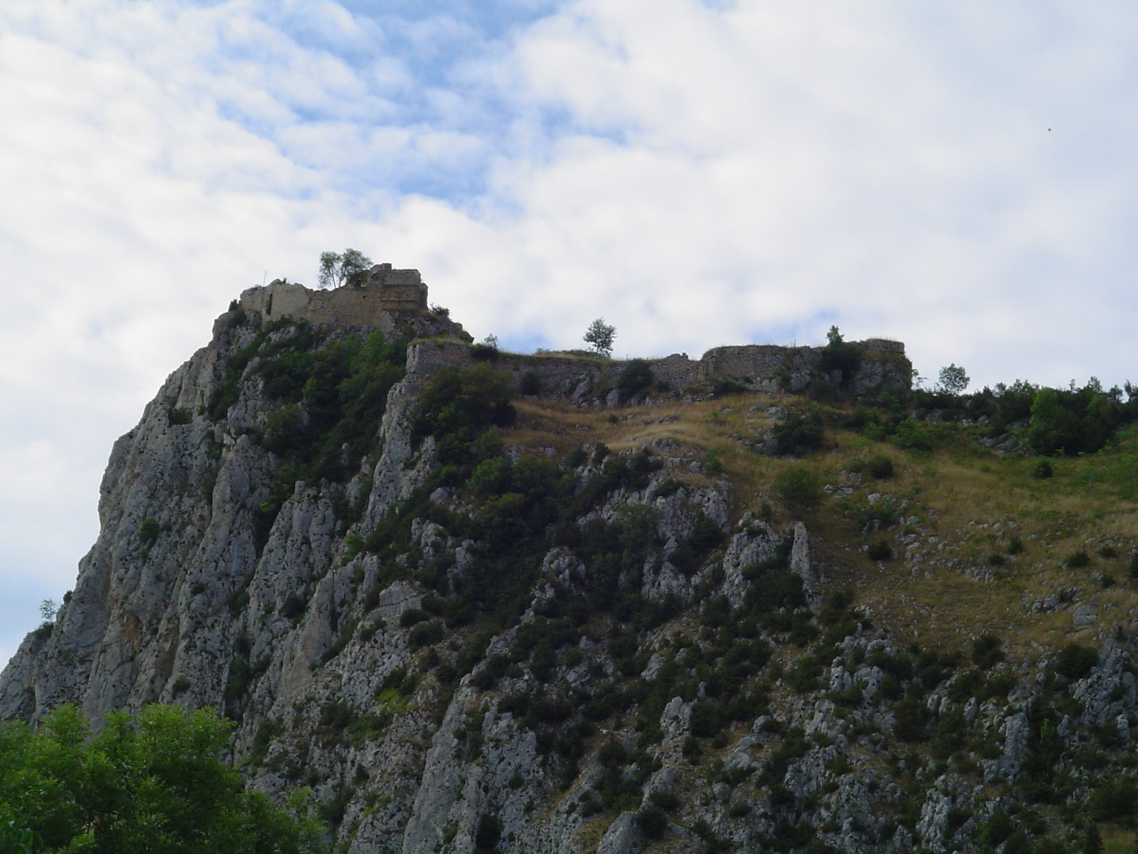 Château de Roquefixade (France,09)